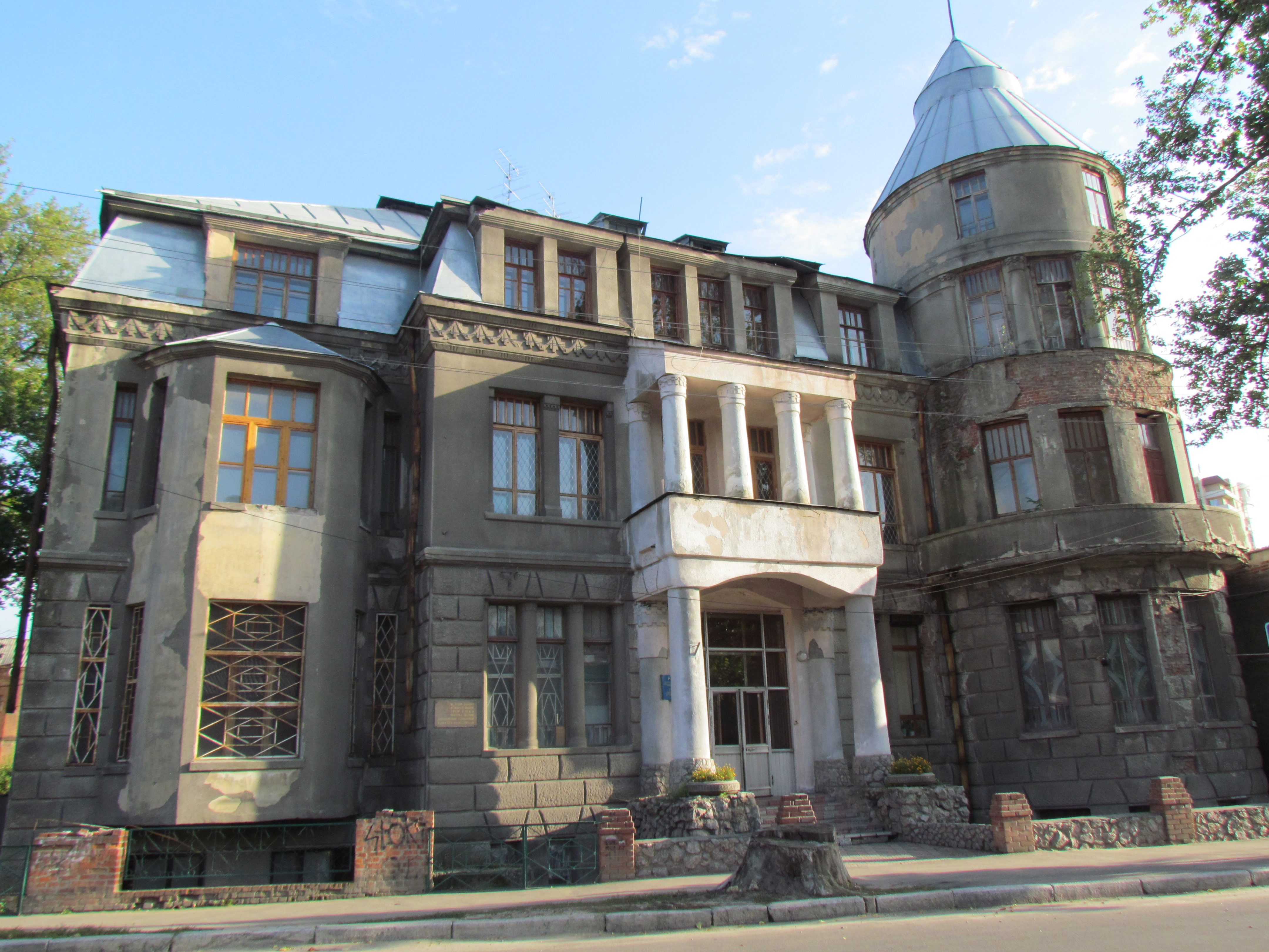 Україна, Харків, вул. Мельникова, 6